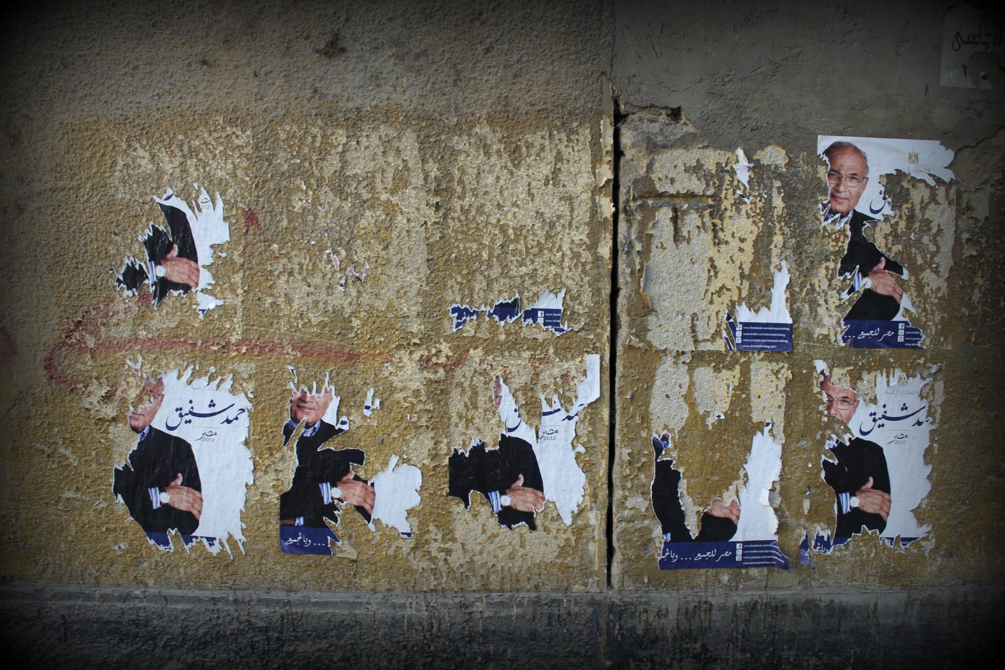 Ahmed Shafik posters in Zamalek